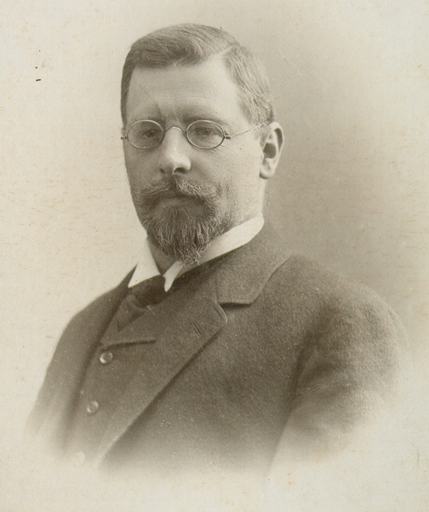 Ivan Šusteršič, Slovene politician.